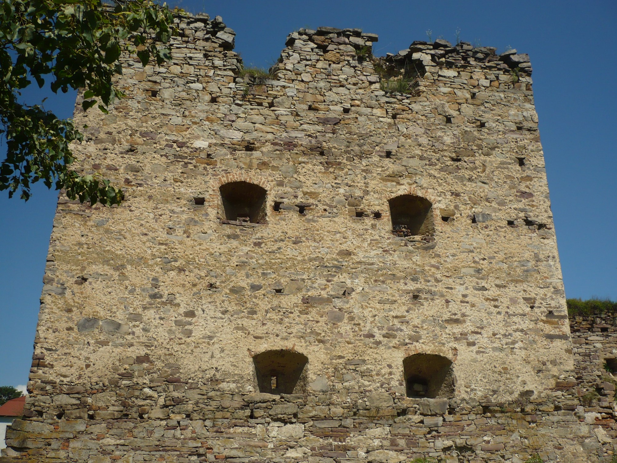 Potok Złoty. Zamek